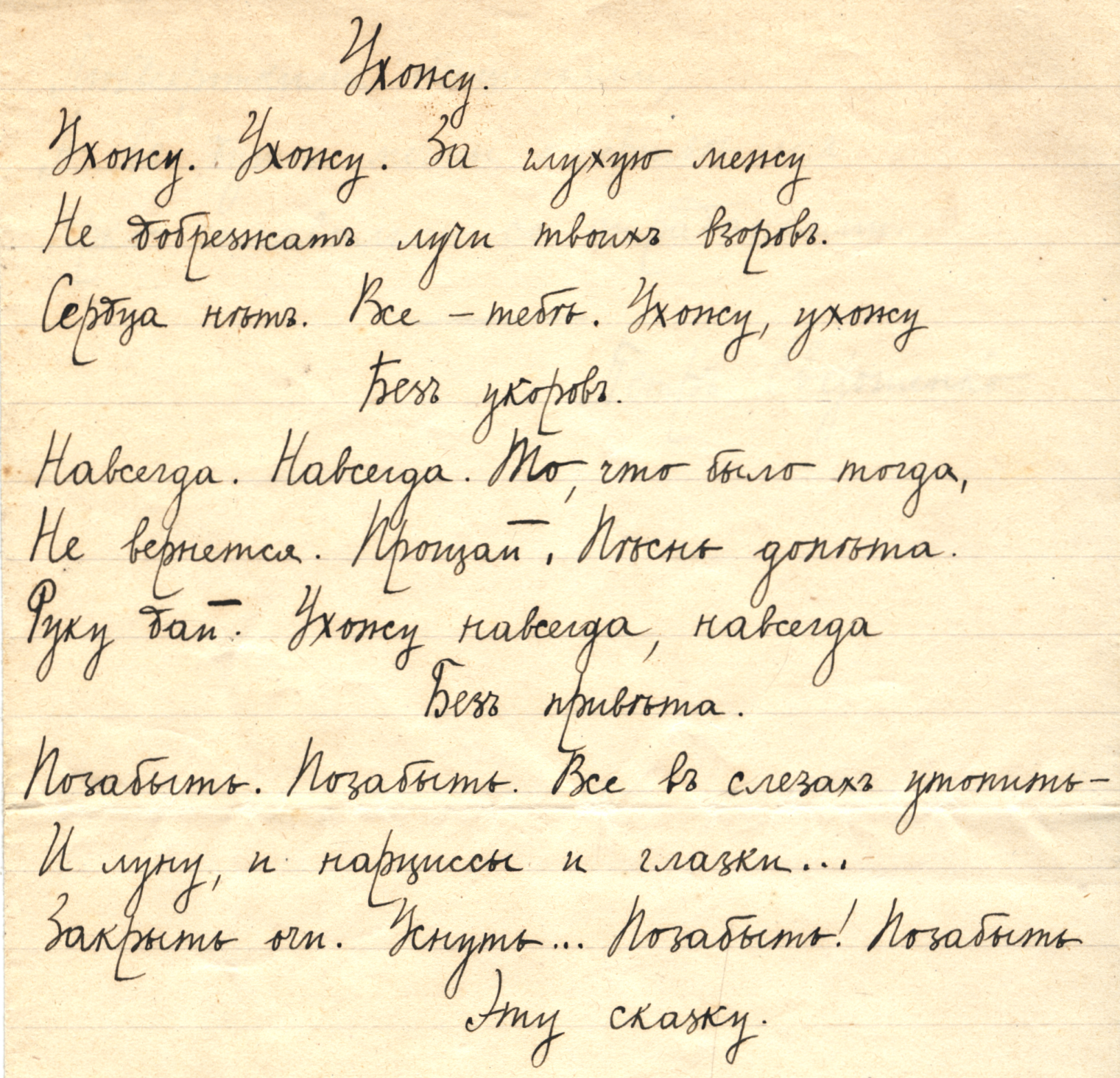 Фотография рукописи стихотворения Петра Евдошенко "Ухожу".